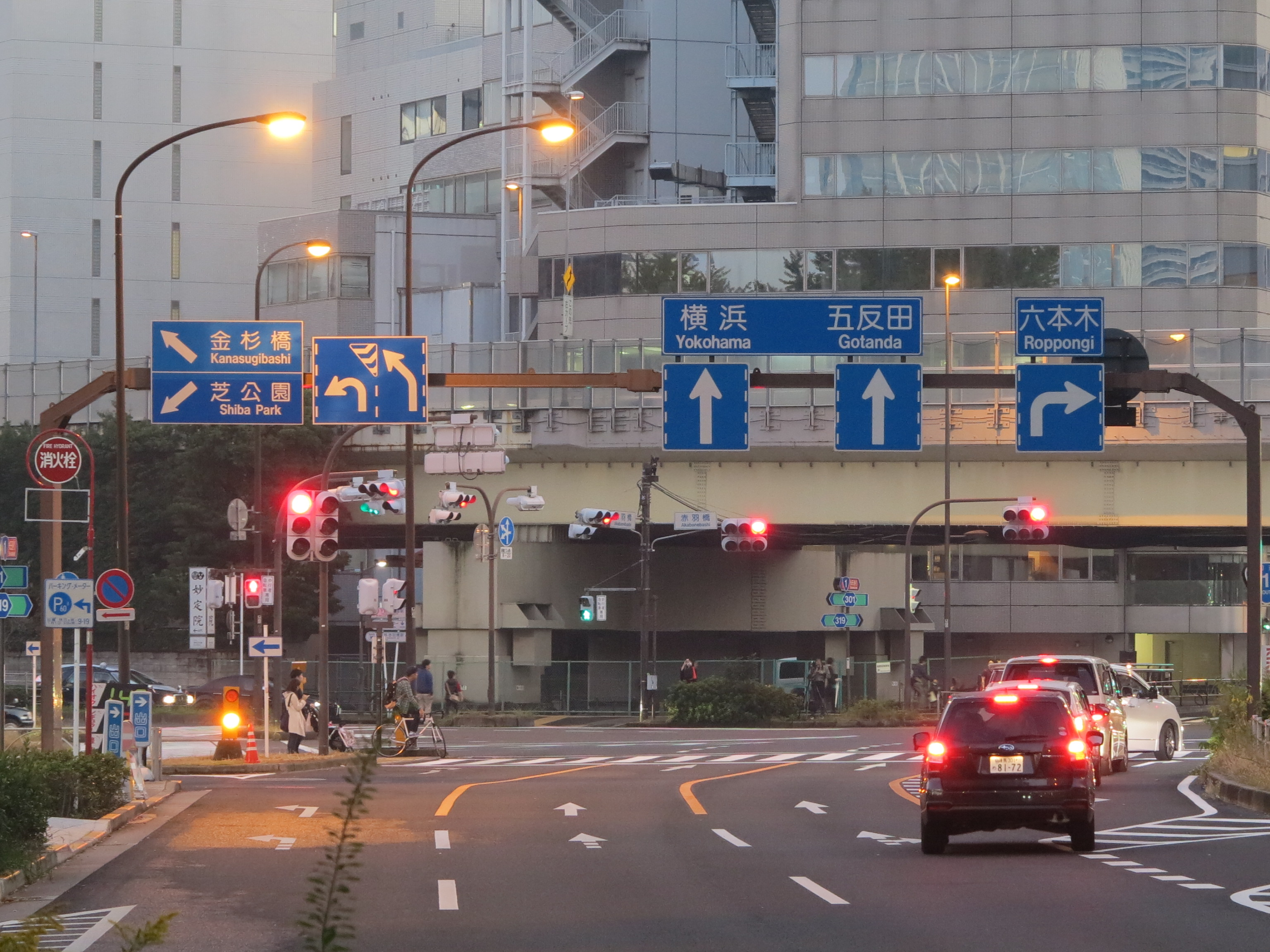 港区の赤羽橋交差点